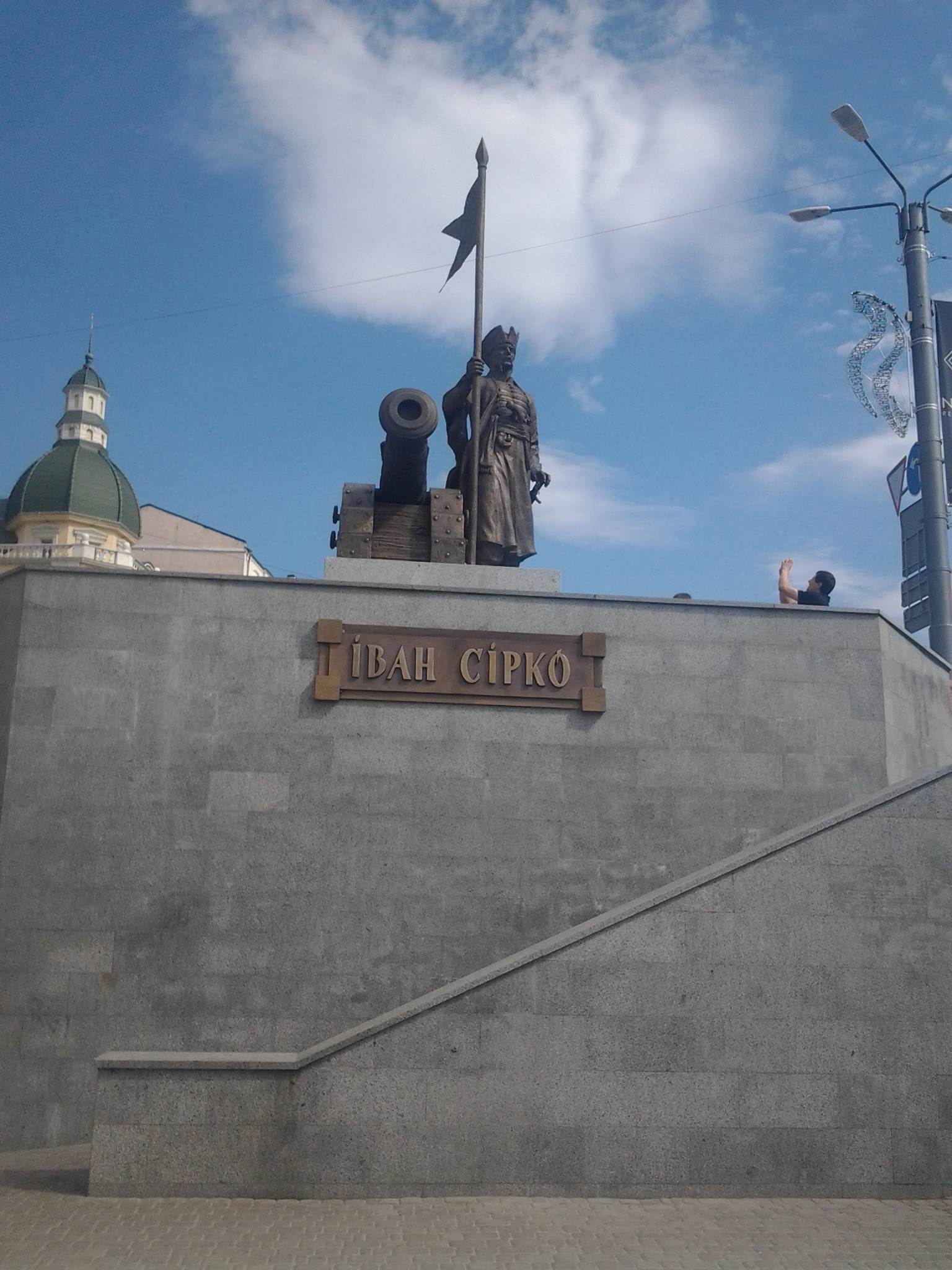 "Фотографія пам'ятника Івану Сірку у Харкові біля станції метро Історичний музей"